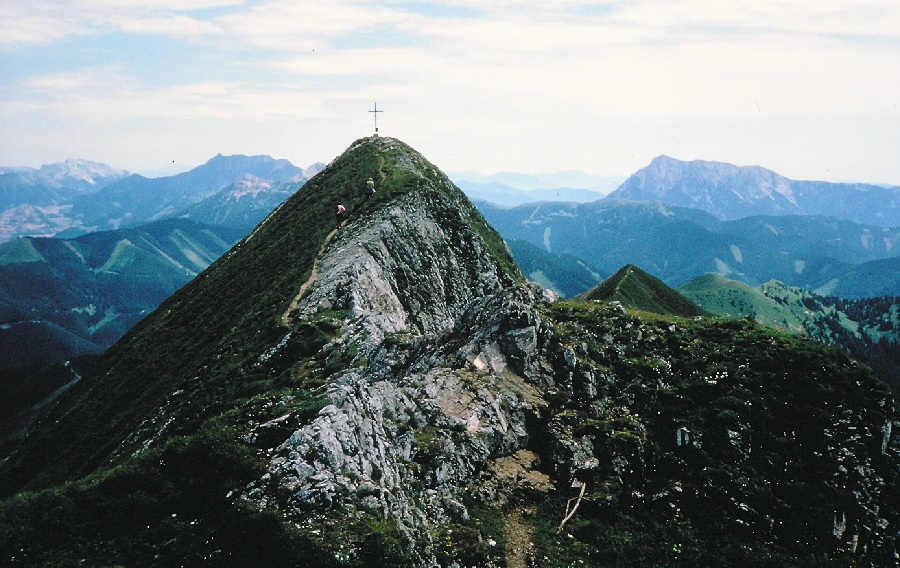 Der Gipfel des Zeiritzkampel, September 1984